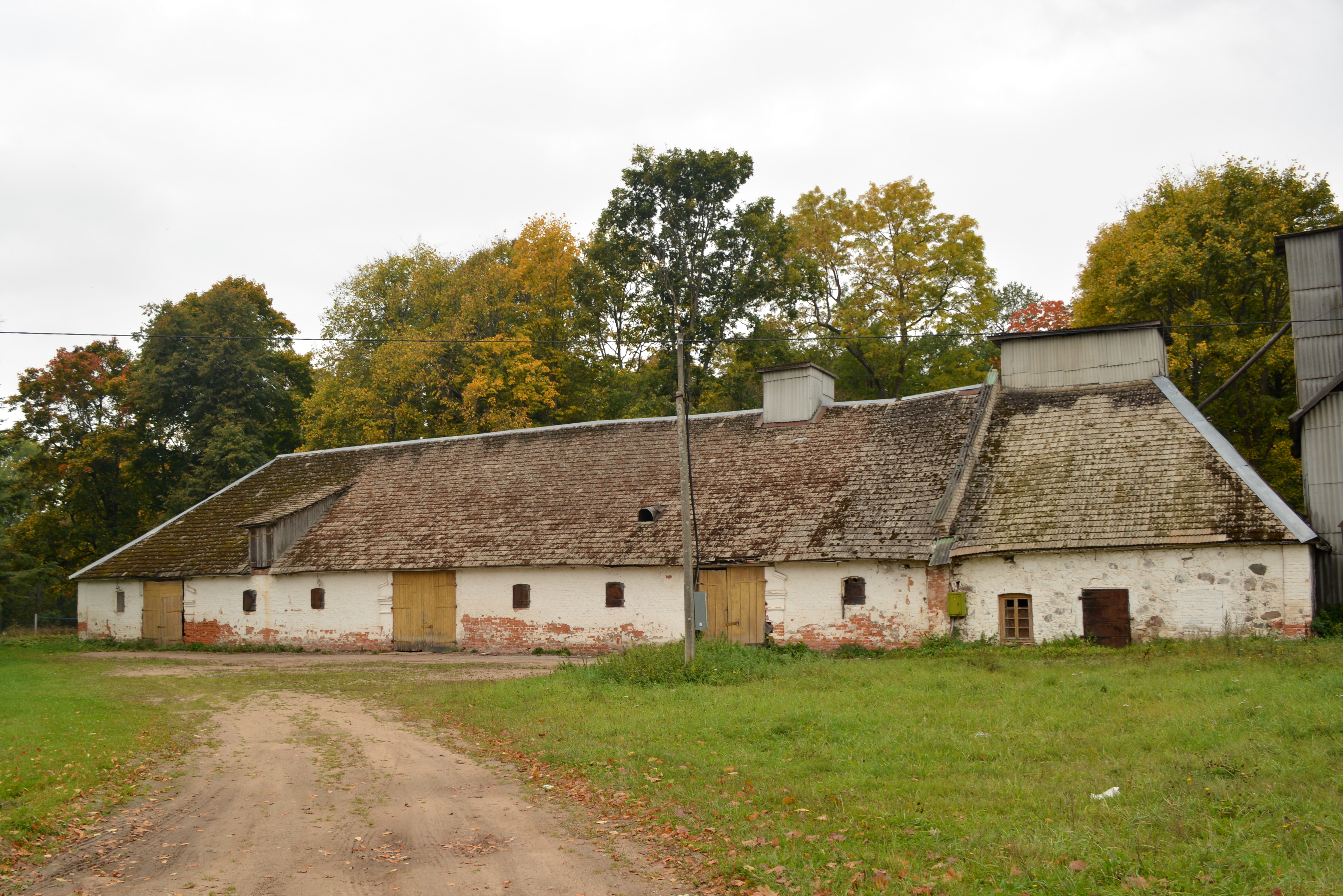 Kavastu mõisa ait